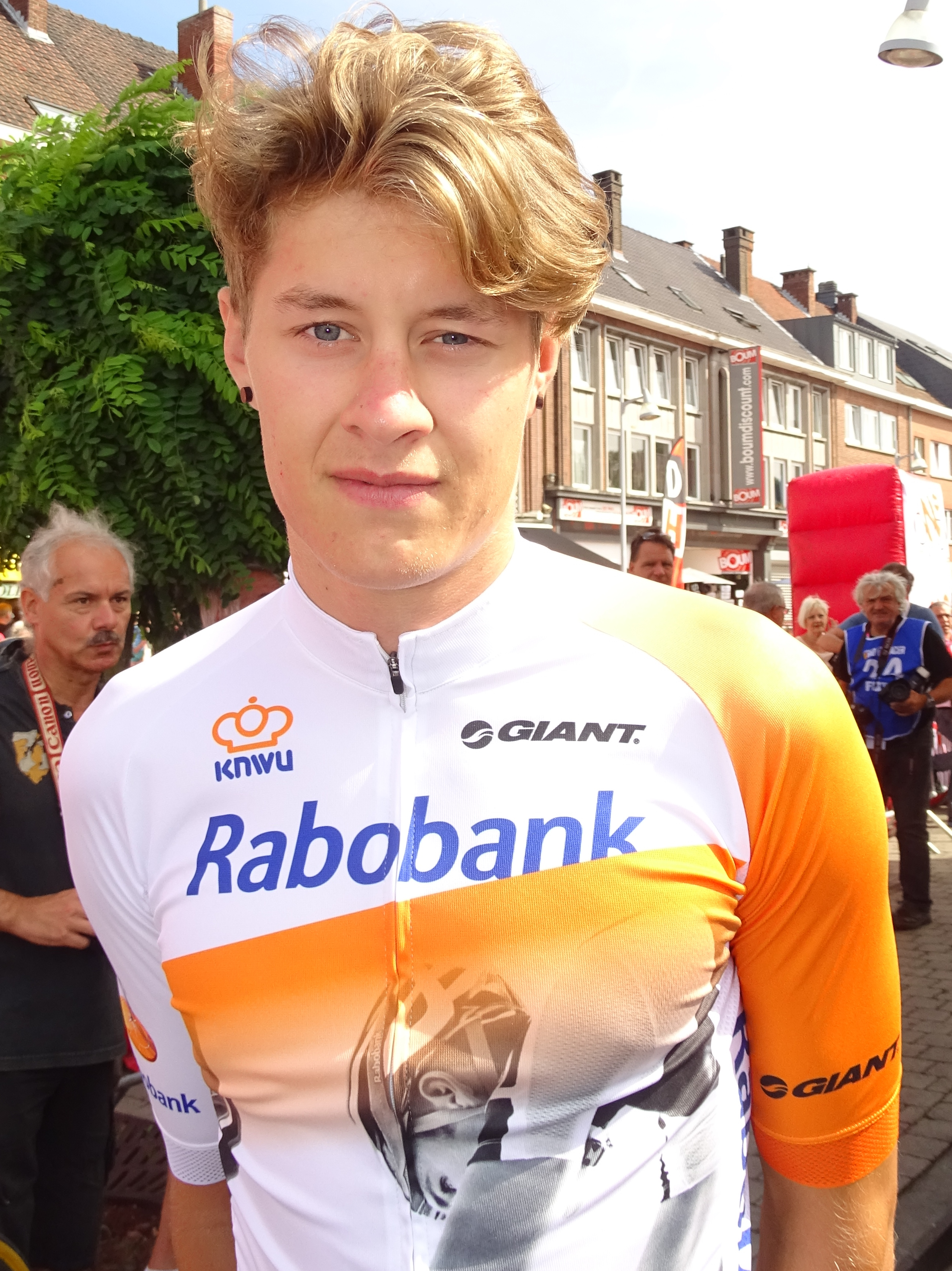 Reportage réalisé le mercredi 22 juillet à l'occasion du départ du Grand Prix Pino Cerami 2015 à Saint-Ghislain, Belgique.